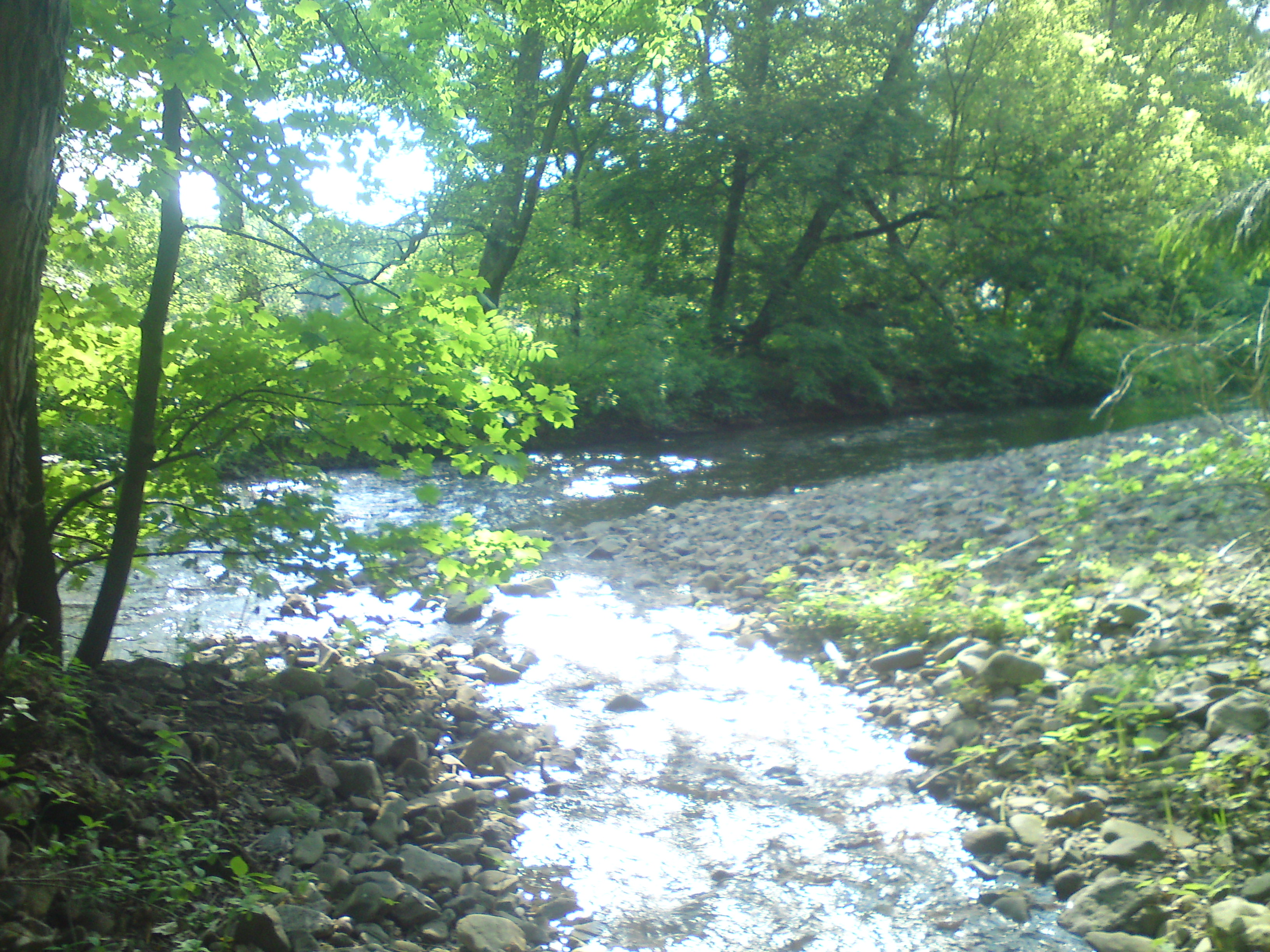 Große Steinau direkt vor der Mündung im Naturschutzgebiet Siebertal